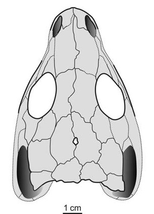 Platyhystrix skull